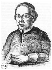 Kaplan Andreas Faulhaber Glatz, Martyrer des Beichtgeheimnisses